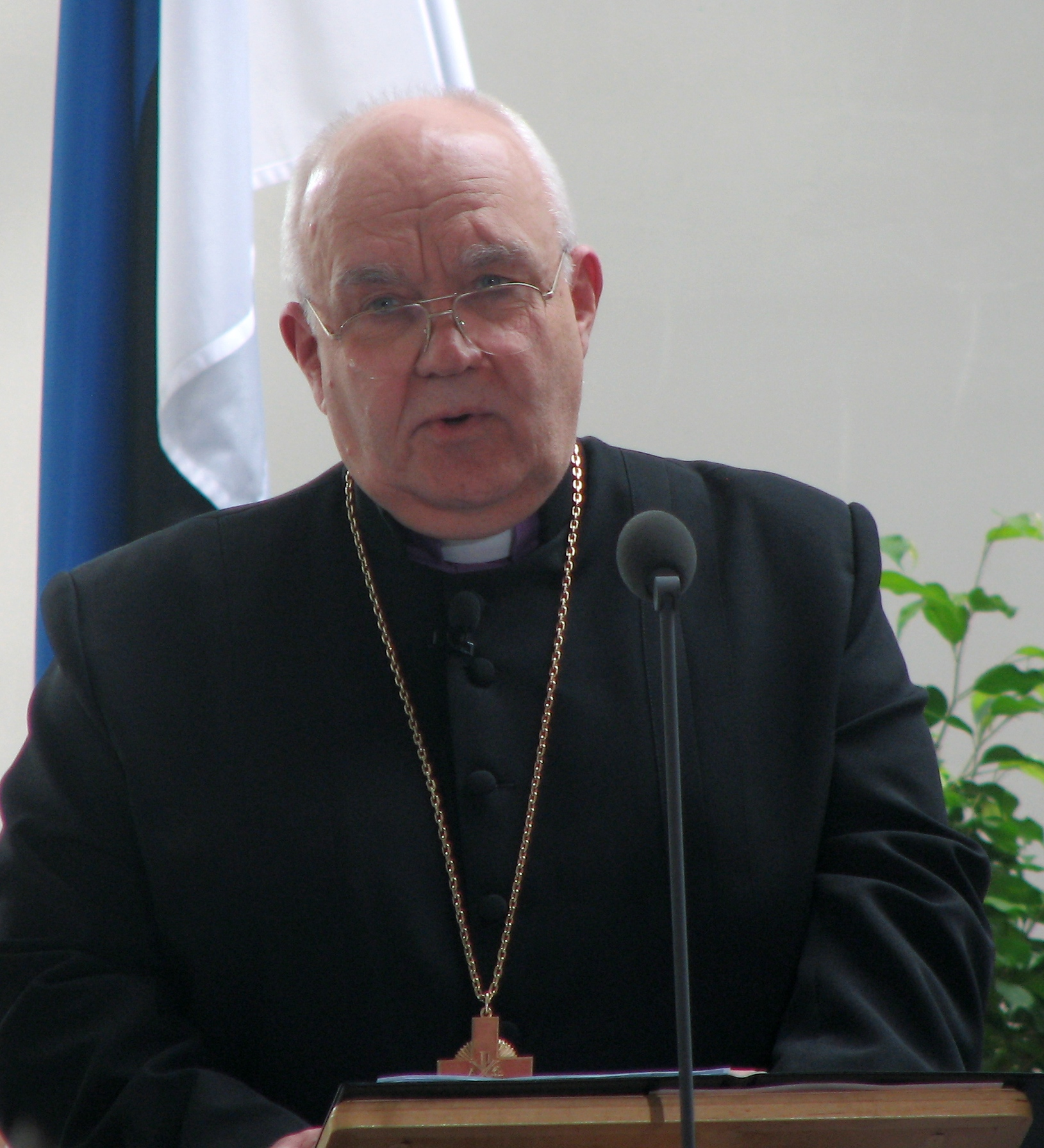 Einar Soone teenimas nelipüha oikumeenilisel jumalateenistusel Harkujärve Stefanose Kirikus